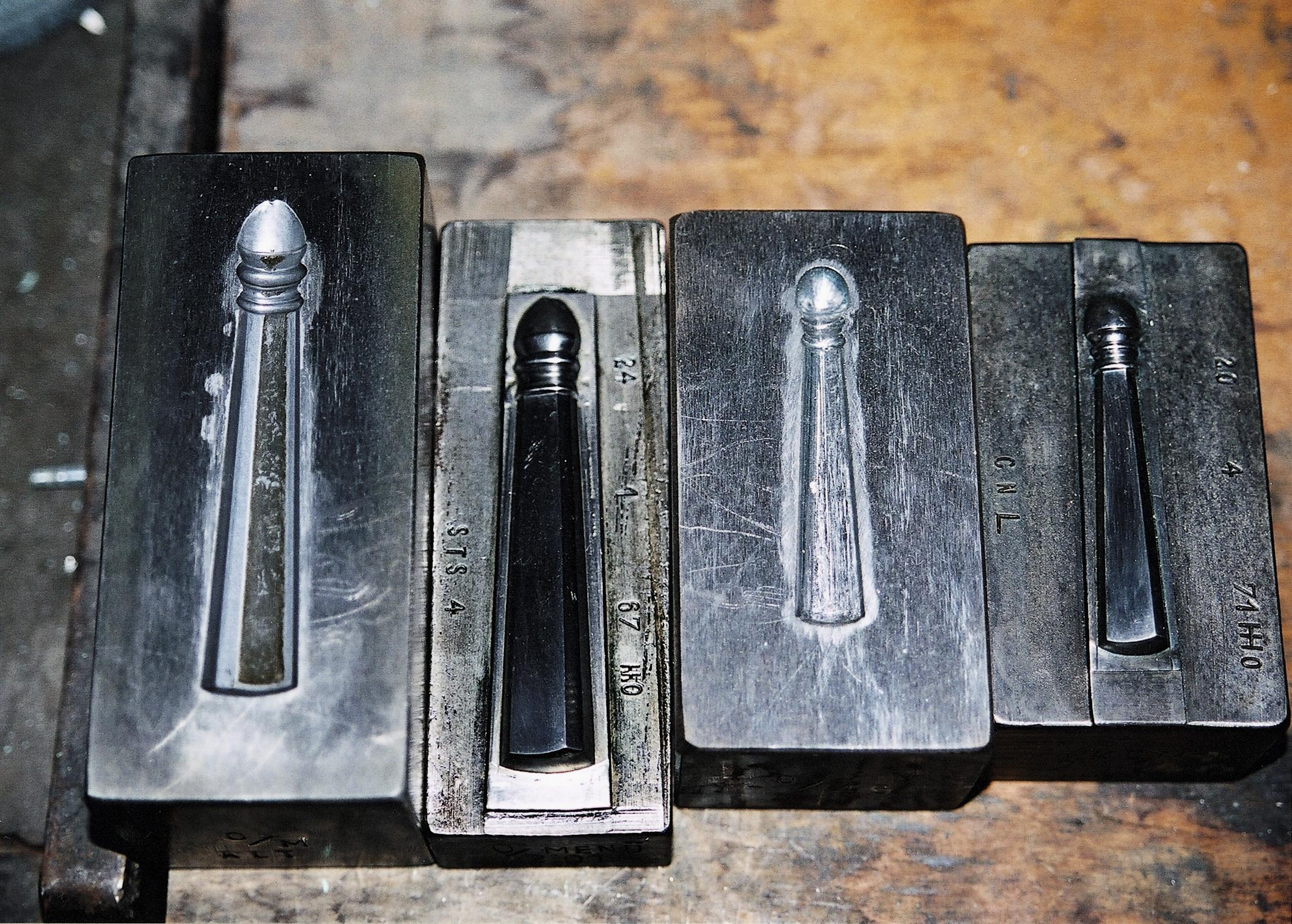 Prägestöcke